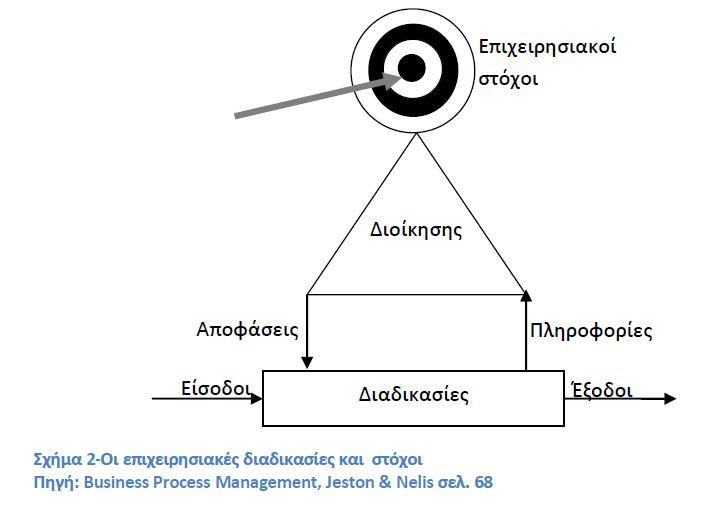 Οι επιχειρησιακές διαδικασίες και στόχοι